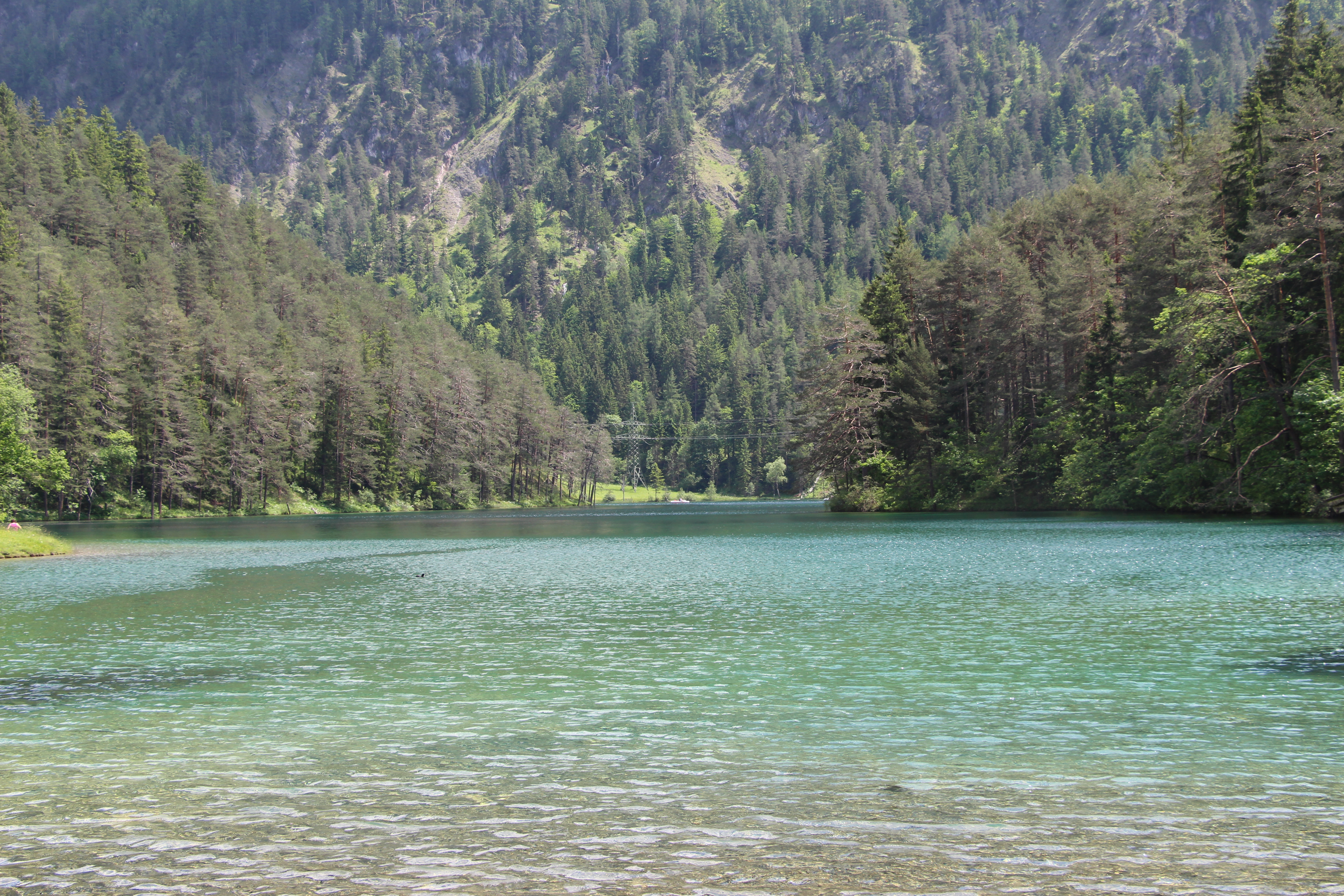 Fernsteinsee am Fernpass in Nassereith, Tirol